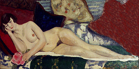 Respose